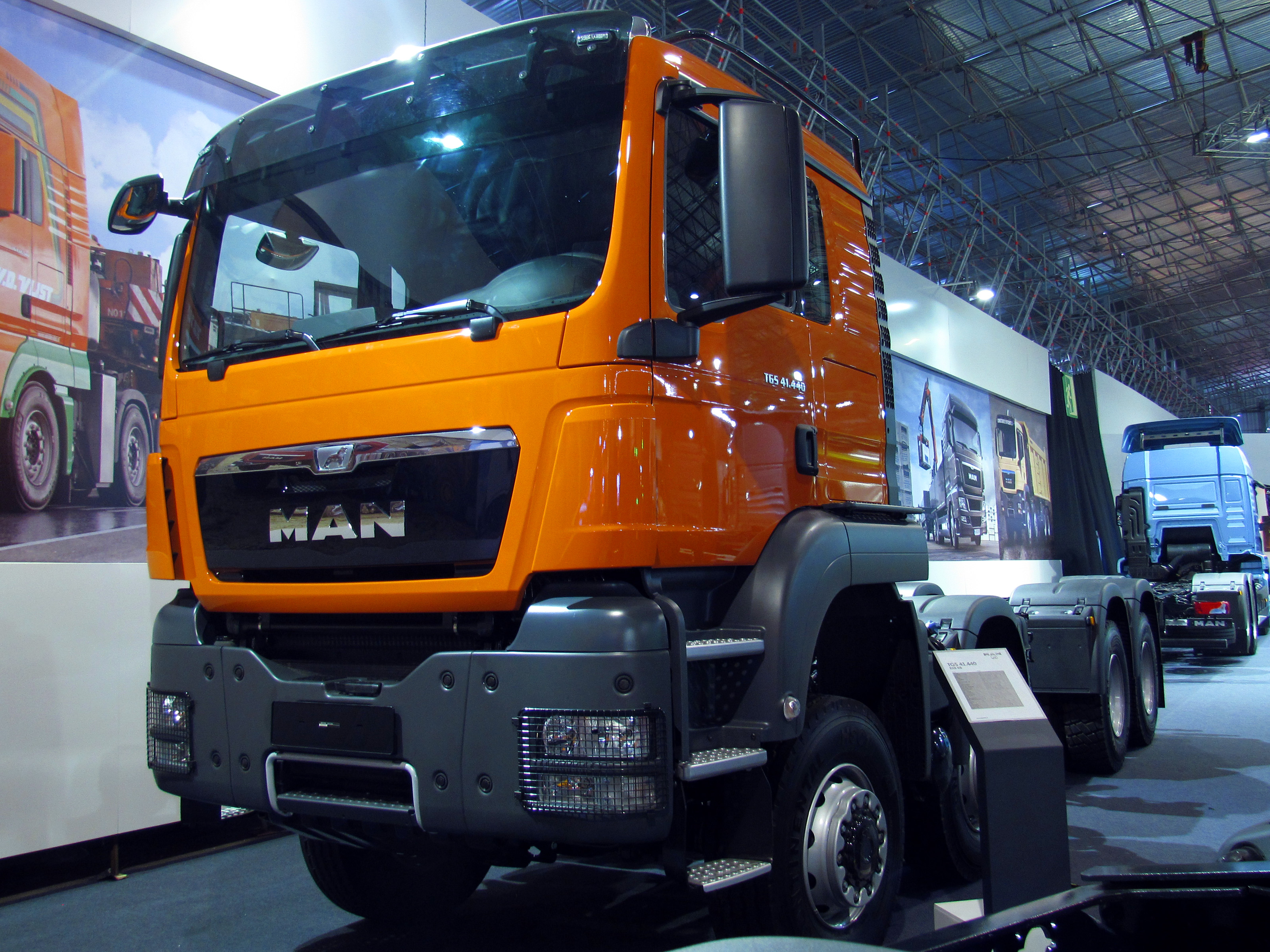 MAN TGS 41.440 8x4 2014